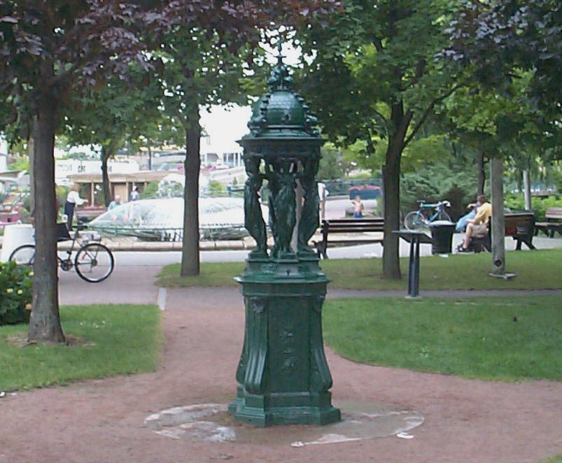 Fontaine Wallace située dans le Parc des Îles (jardin de la France) à Montréal